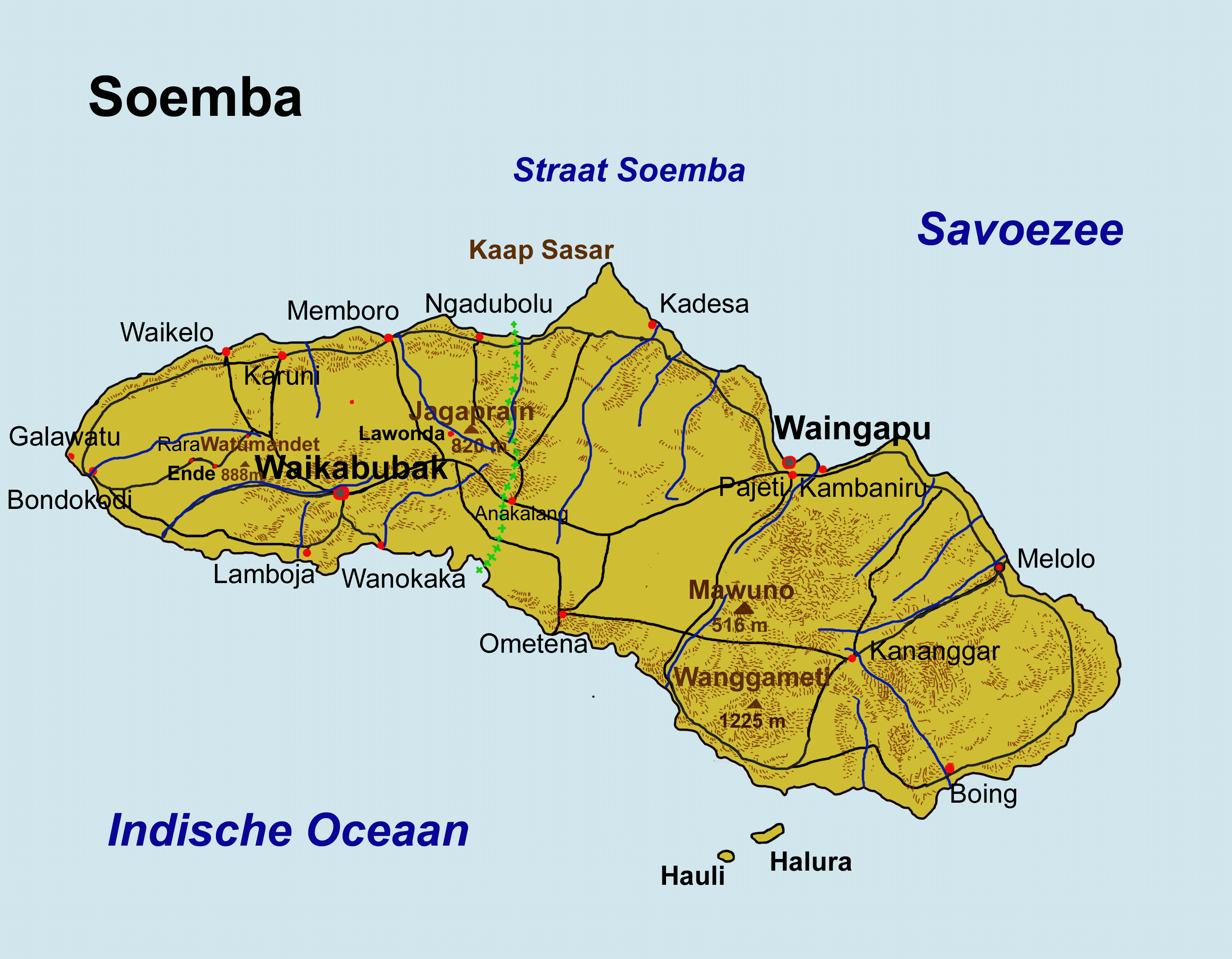 Zelf gemaakte kaart van soemba